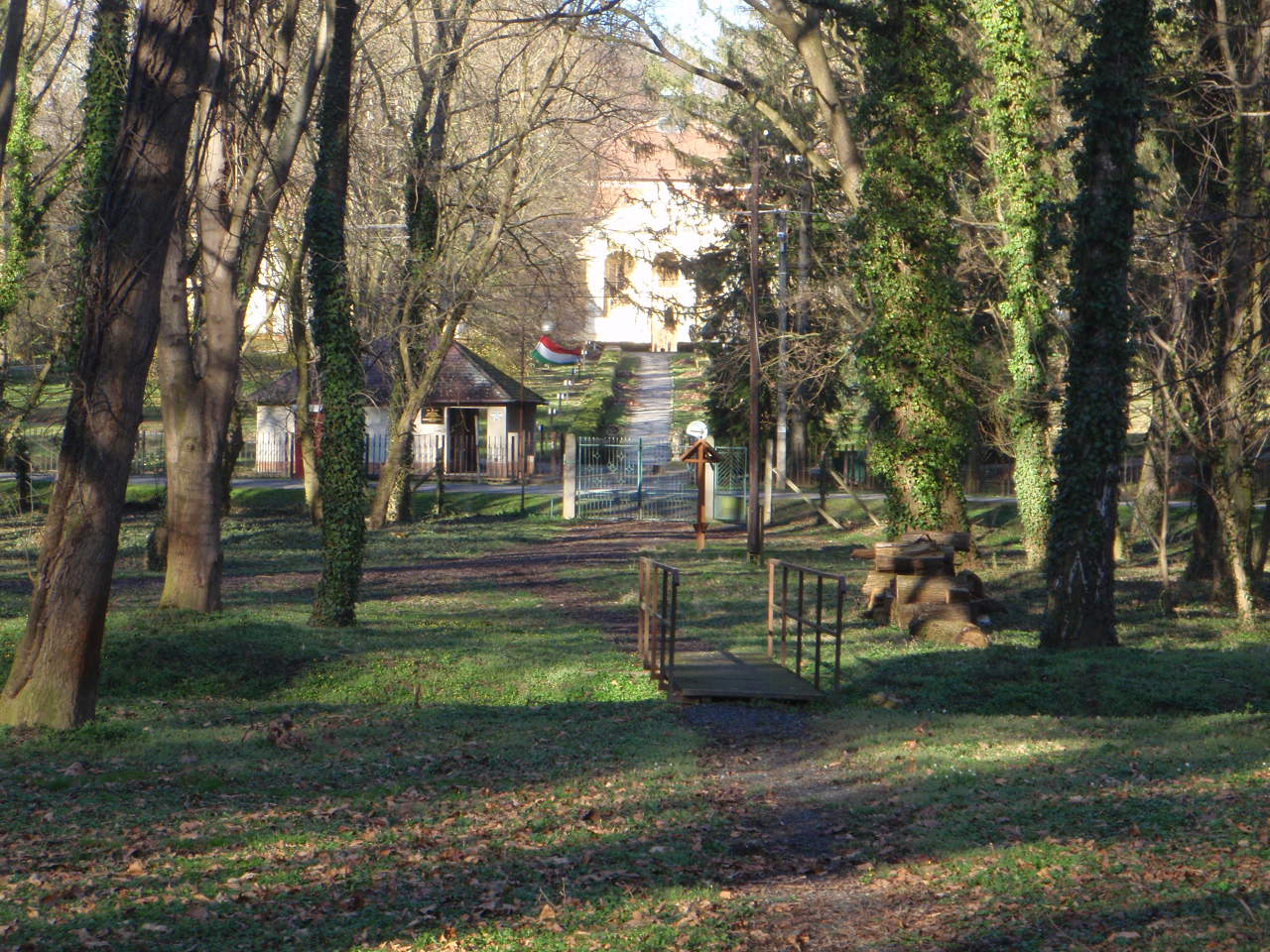 Peresznye allé a kehelytől a kastélyig